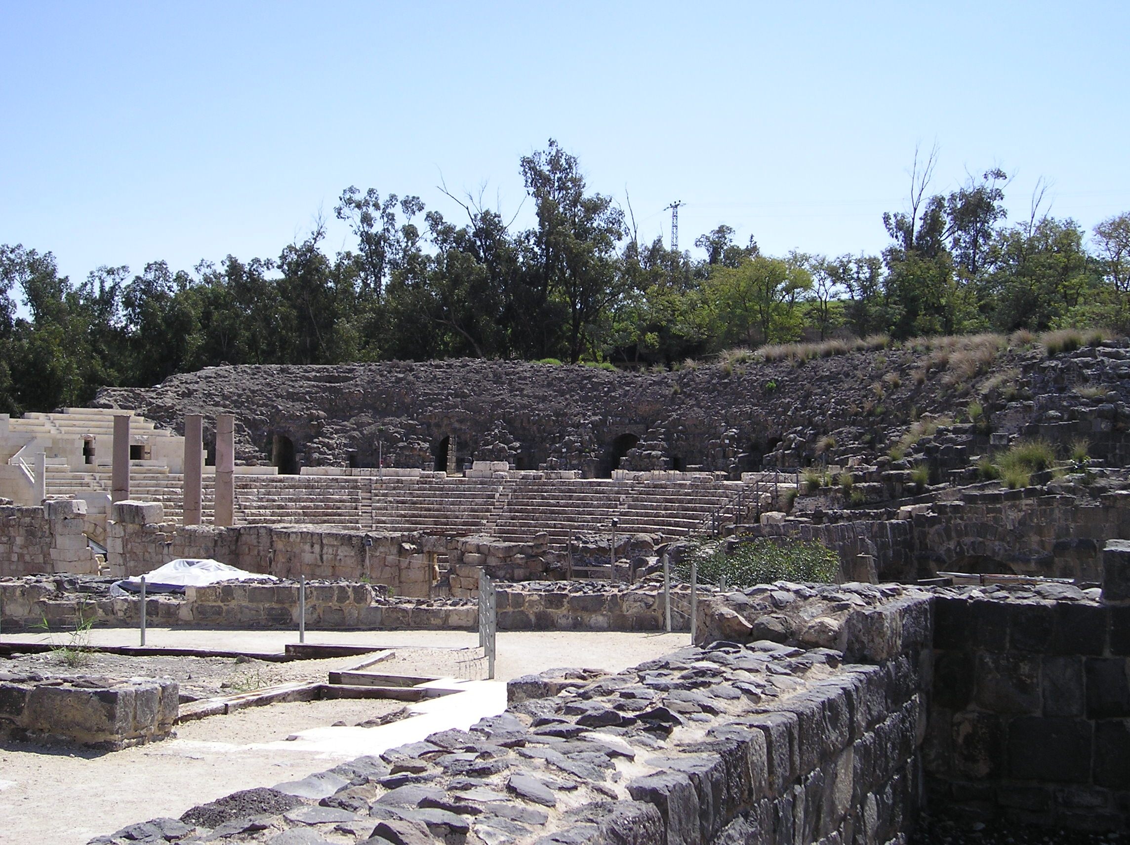 Bet Szean (stanowisko archeologiczne - Scytopolis) w Izraelu. Widok od strony "Palladius Street" bizantyjskiej ulicy. Na pierwszym planie pozostałości teatru z I-II wieku.